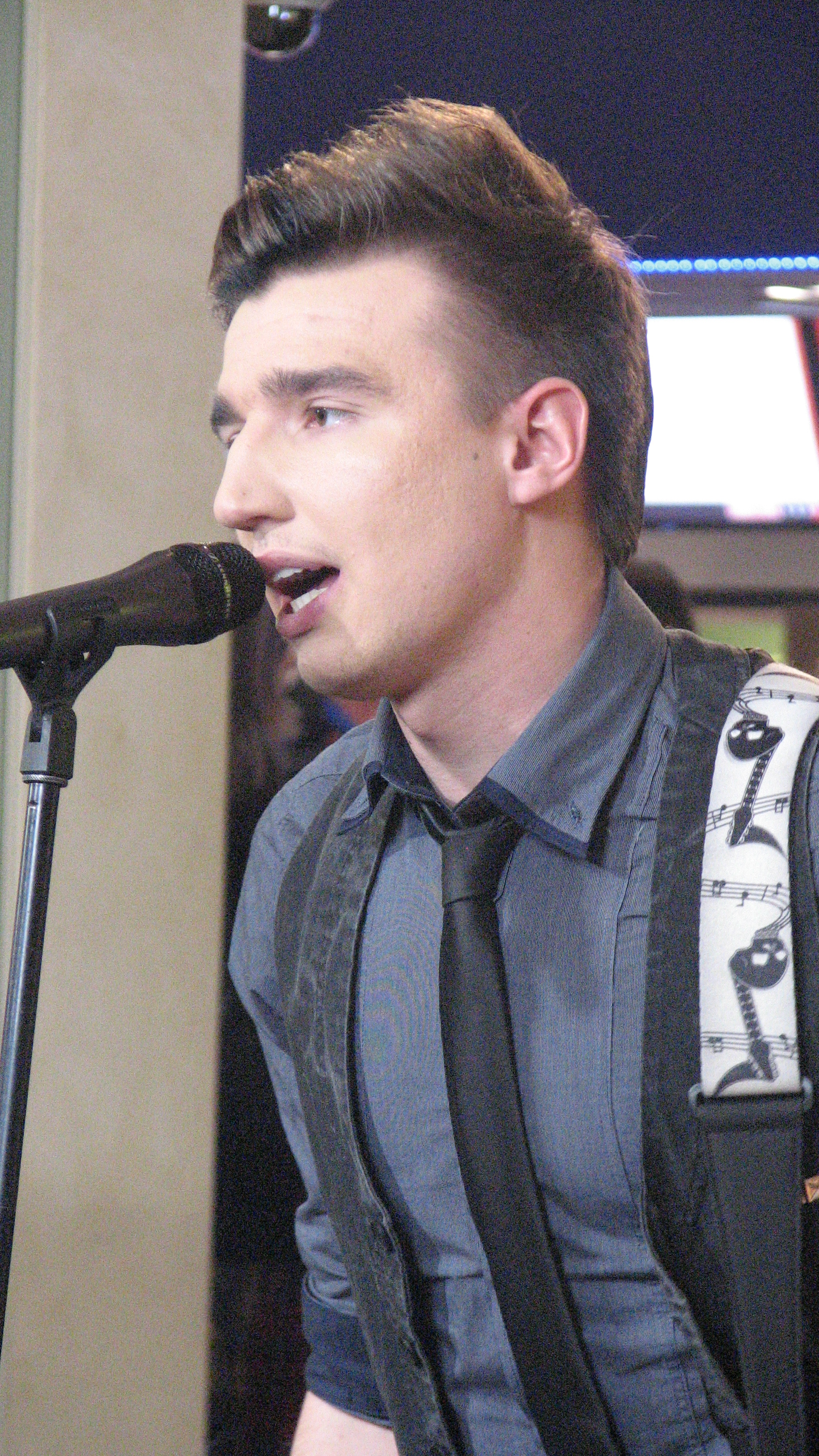 Artjom Savitski Ringvaate Eesti Laulu salvestusel Mia taustalauljana